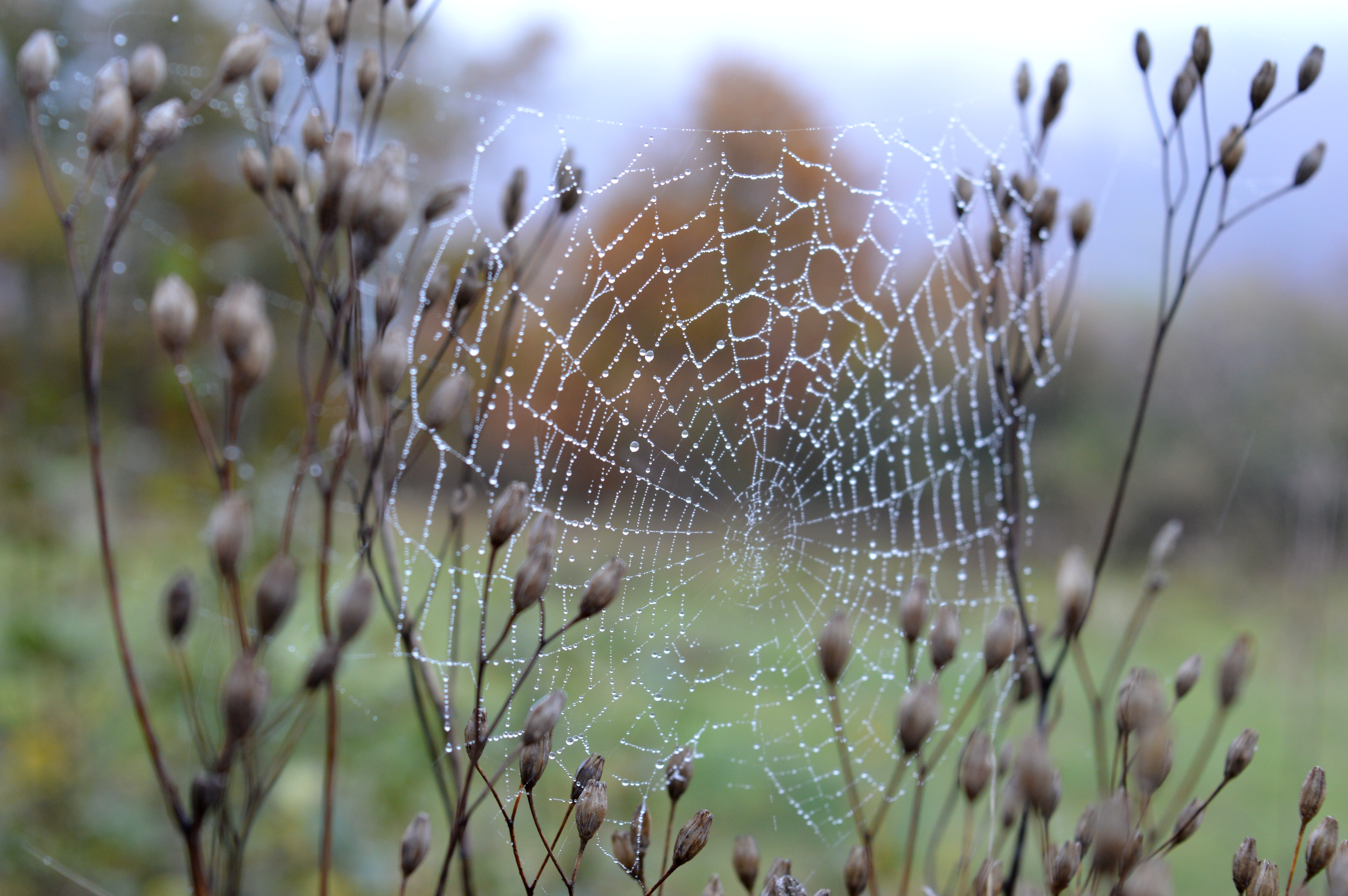 паучина са кишним капима Ово је фотографија заштићеног природног добра у Србији под шифром: ПП13 This is a a photo of a natural area in Serbia with ID: ПП13